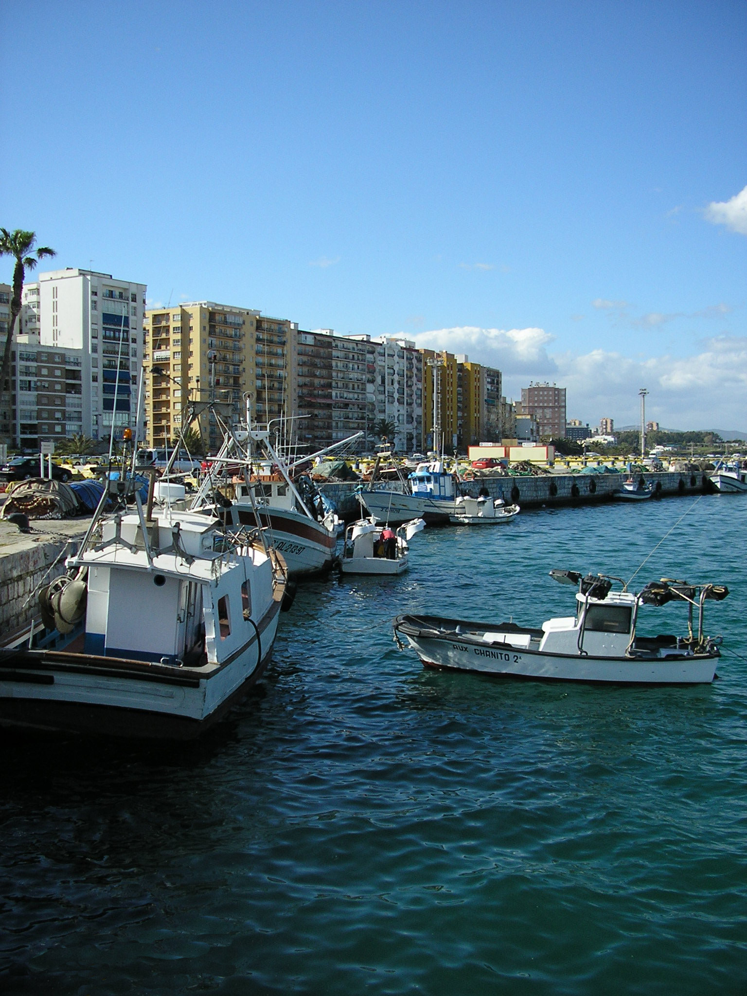 Dársena pesquera del puerto de Algeciras, Andalucía, España